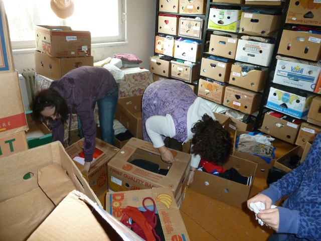 Dobrovolníci uklízí v Šatníku